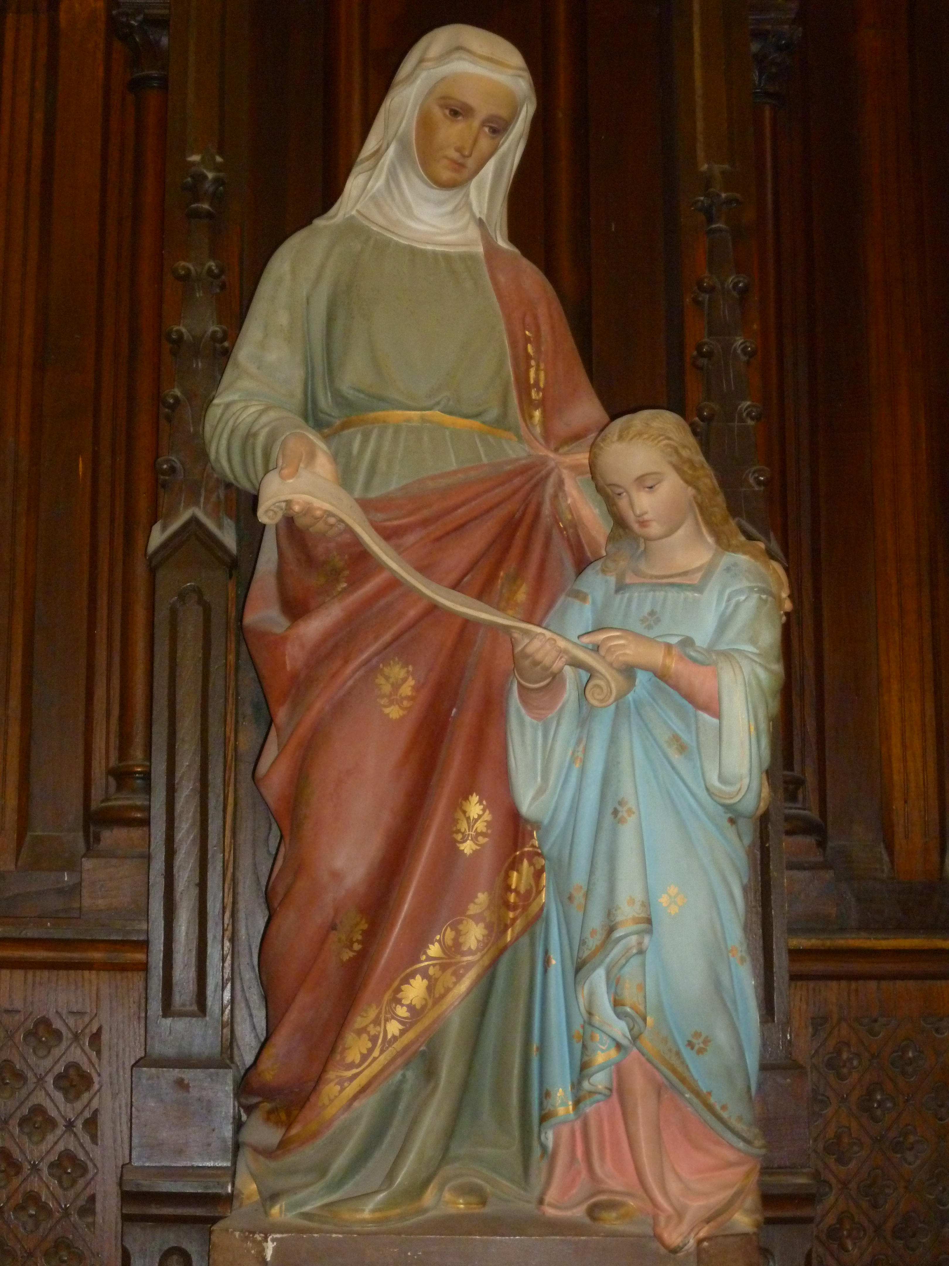 Saint-Anne et sa fille